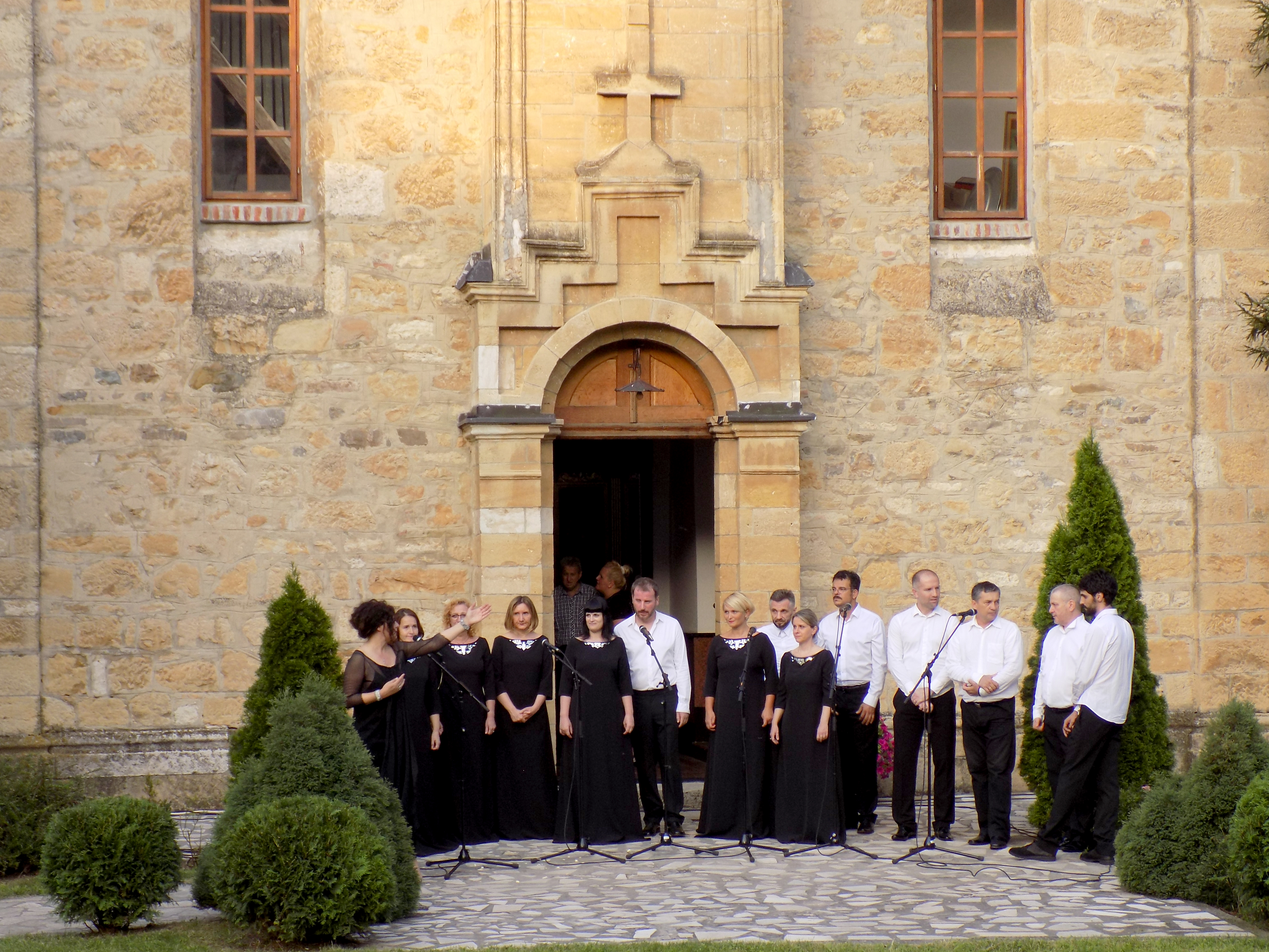 Nastup Divne Ljubojević i hora "Melodi" u programu "Petrovdan u Nemenikućama", u okviru manifestacije "Dani Milovana Vidakovića", 12. juli 2018